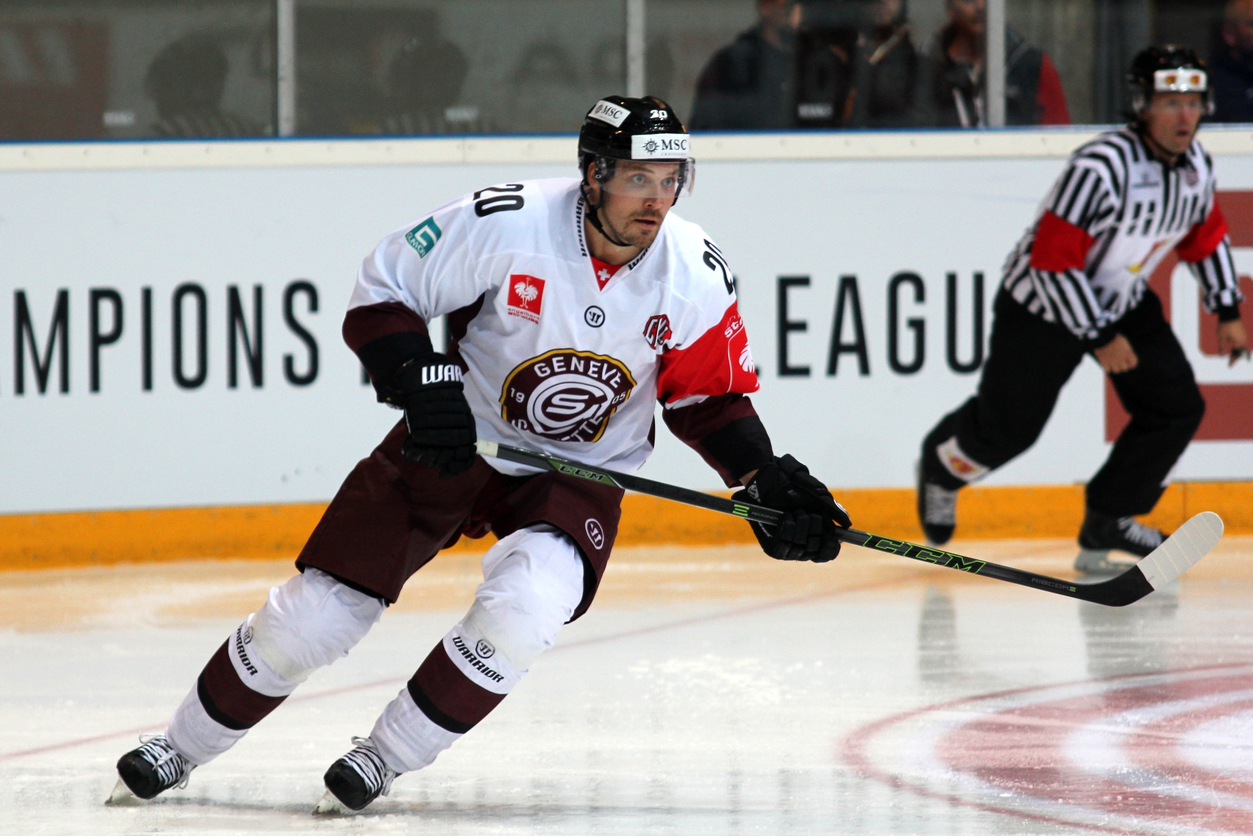 Johan Fransson (G 20).